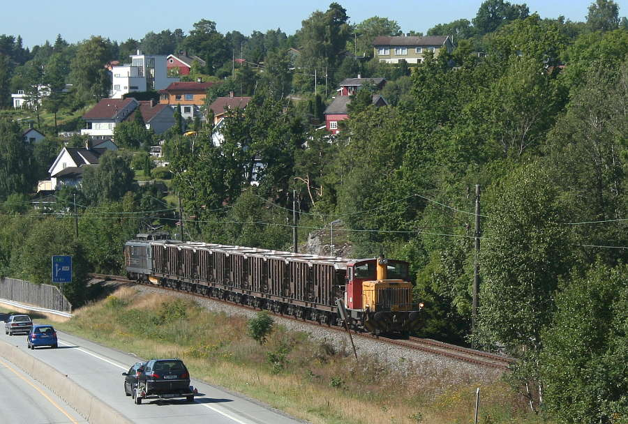 "Kalken" på Brevikbanen